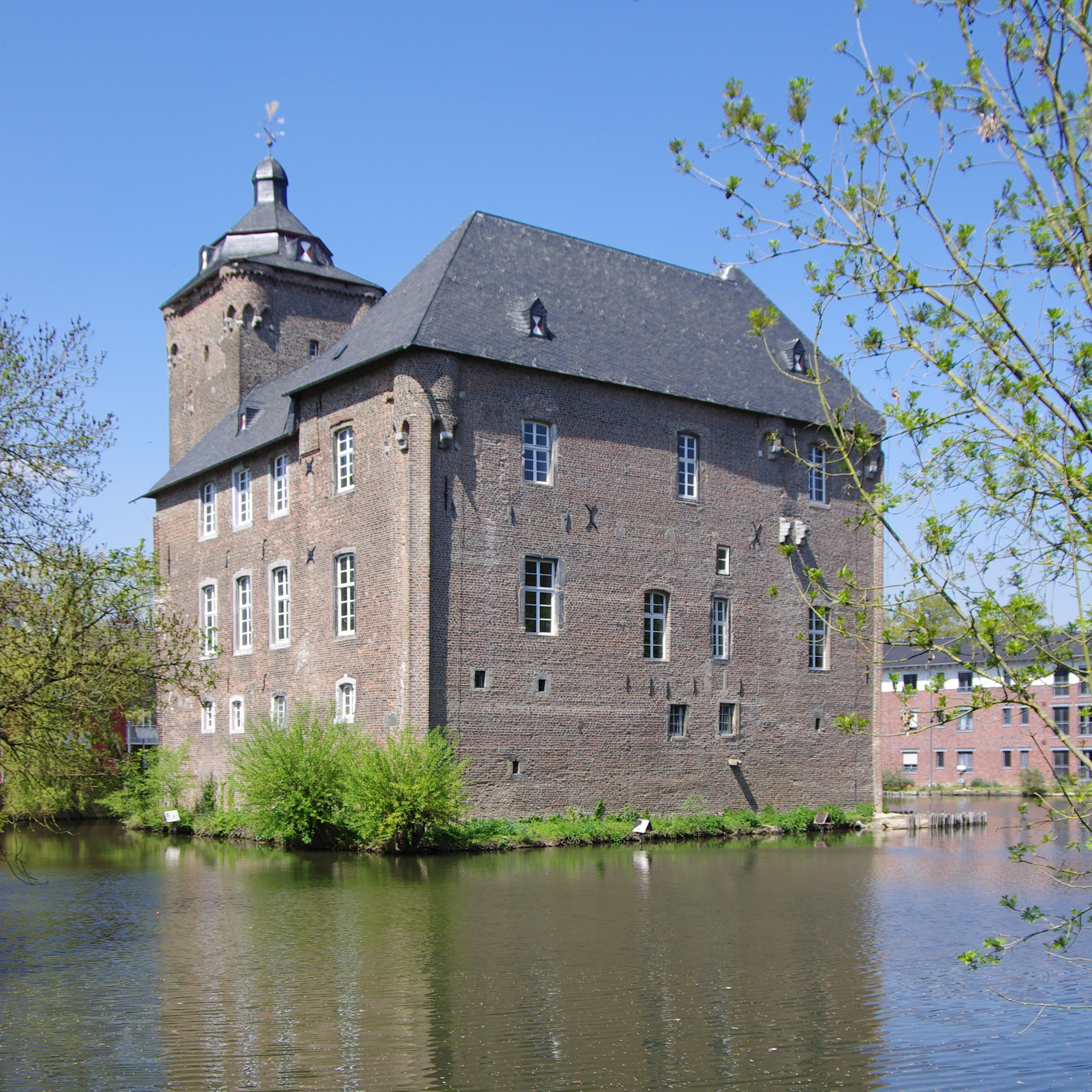 Backsteinherrenhaus aus dem 15. Jahrhundert, einer von drei Gebäudeteilen der Burg This is a photograph of an architectural monument.